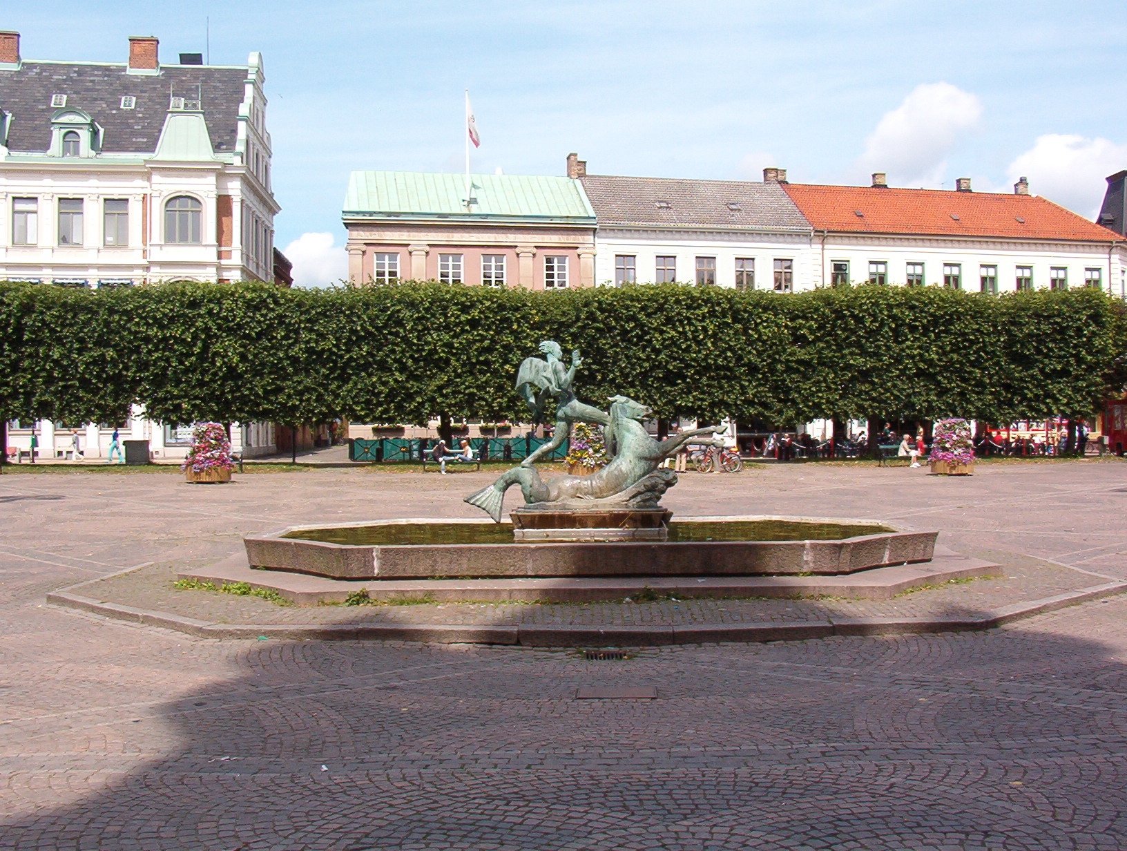 Fontän i centrala Landskrona. Date: probably summer 2003 (not 2002-01-01).